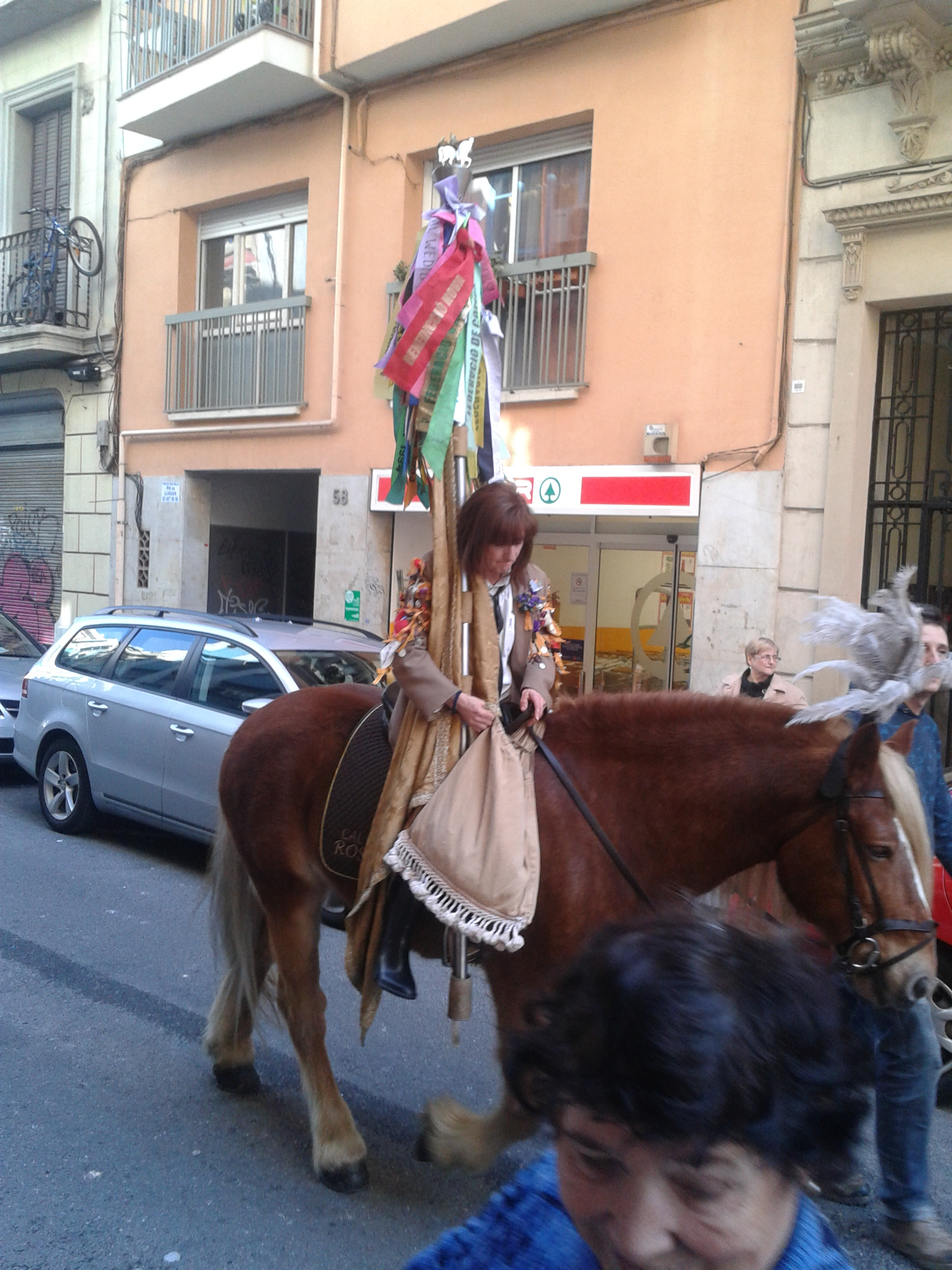 Abanderada de la Colla de Cal Ros durant Sant Medir 2013. (Gr�cia)